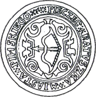 Беларуская (тарашкевіца): Пячатка магістрату места Пінску